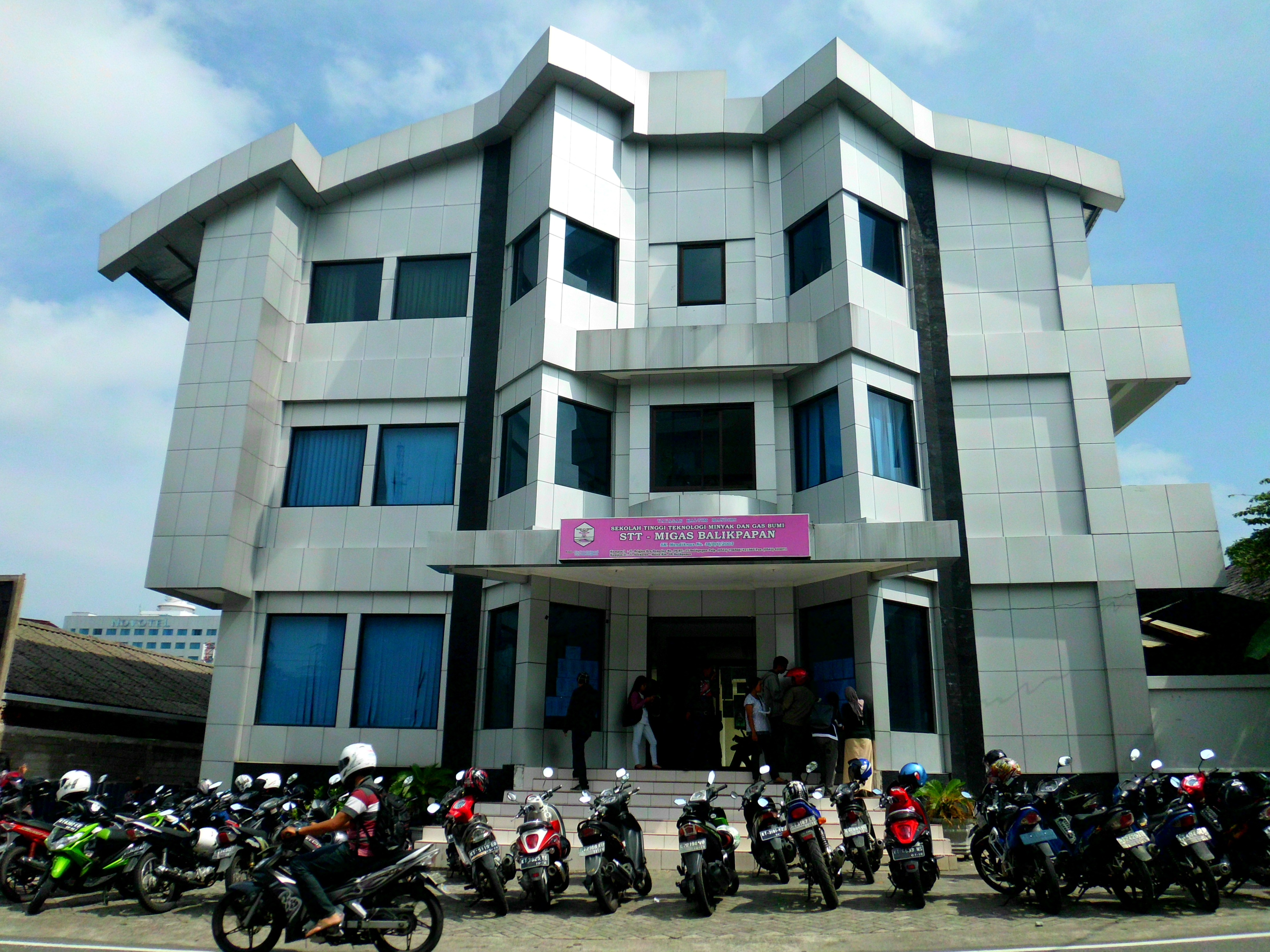 Stt Migas, edificio administrativo, Campus de Balikpapan, Kal Tim.